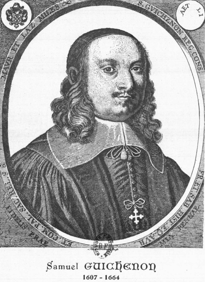 Portrait de Samuel Guichenon